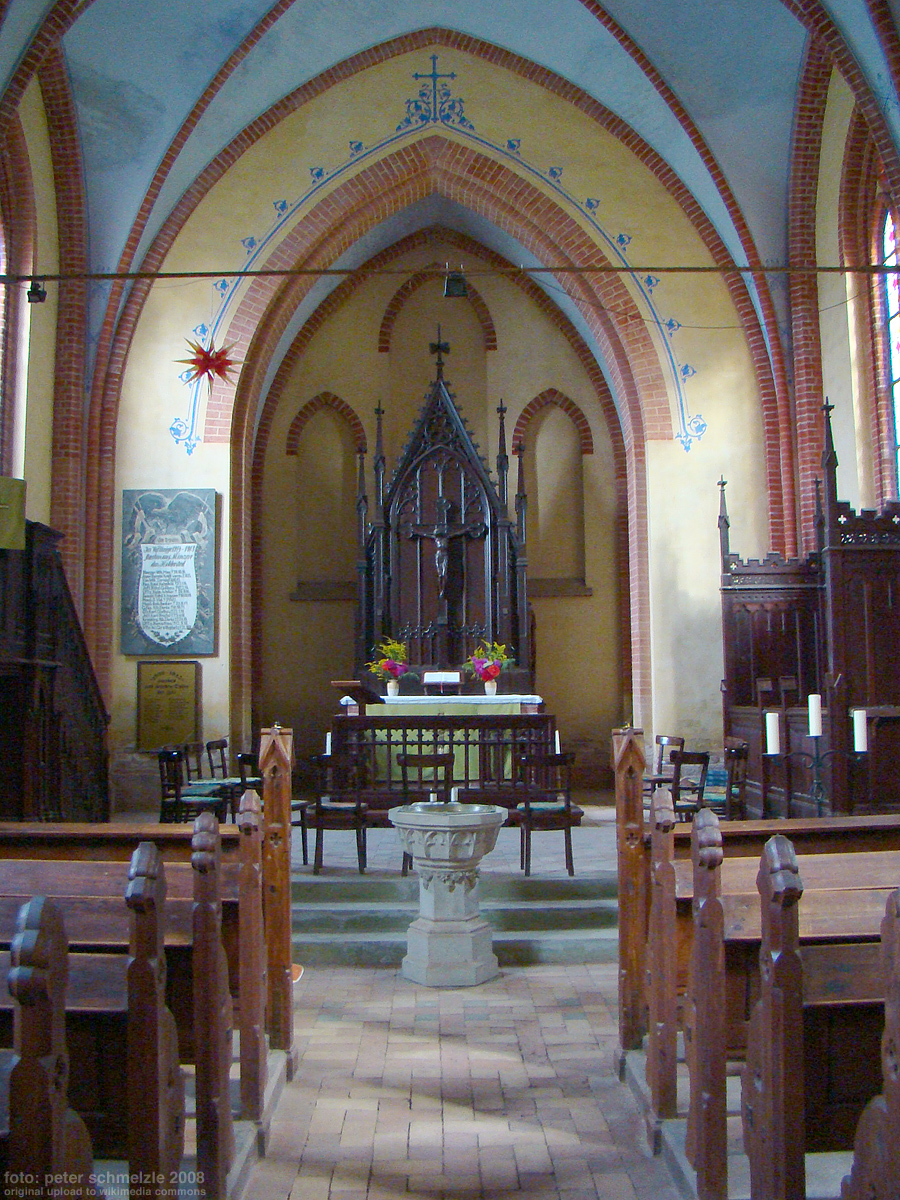 Dorfkirche in Minzow, Leizen, Lkr. Müritz